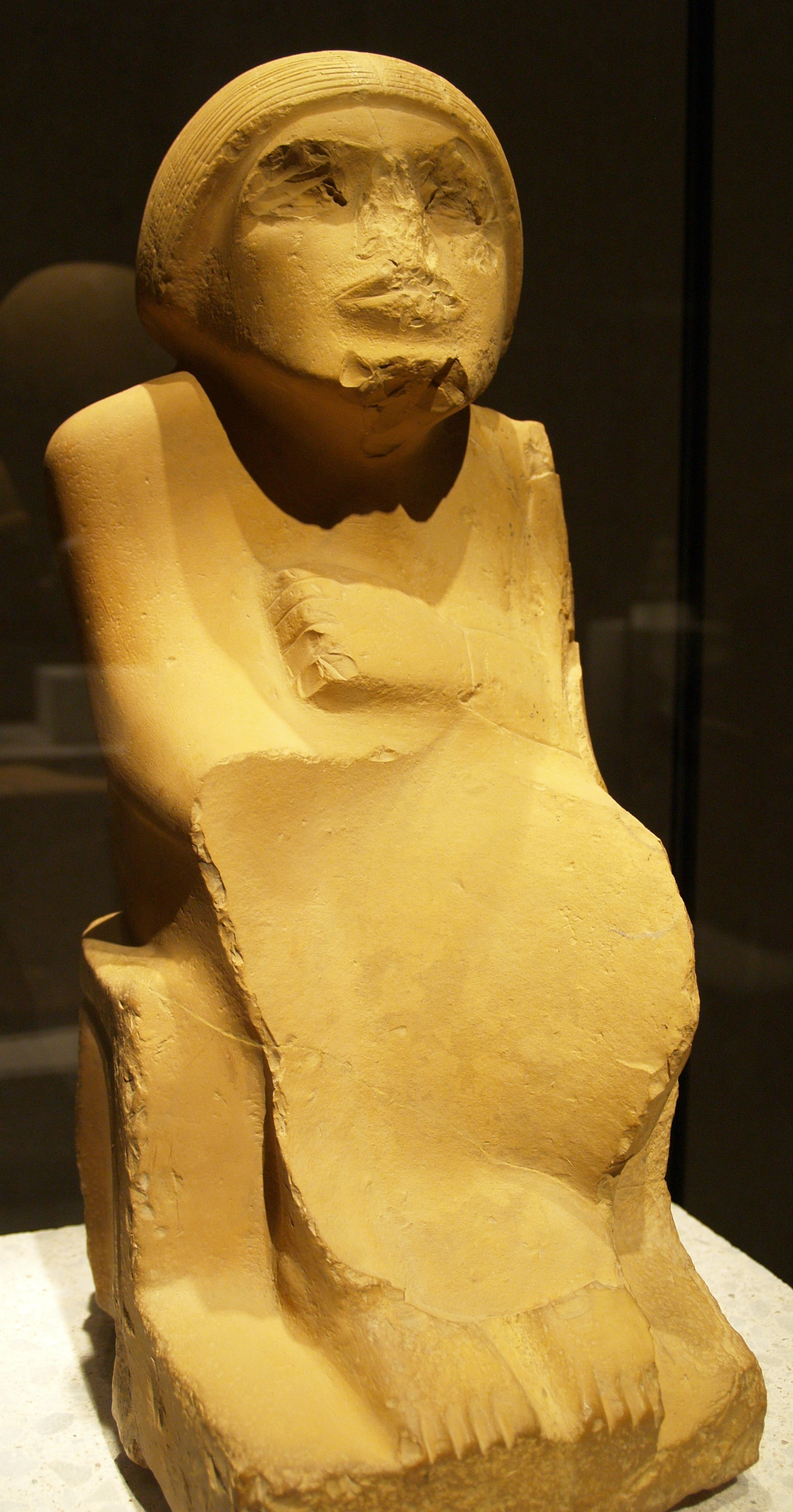 Berlín. Neues Museum. Estatua de la I dinastía.